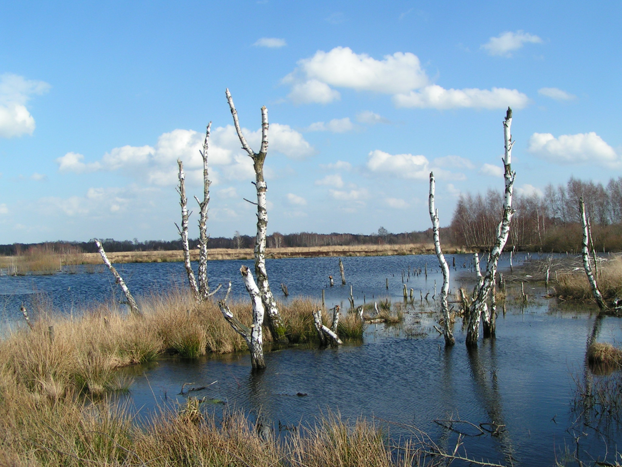 Großes Torfmoor bei Lübbecke / Hille: Wiedervernässung